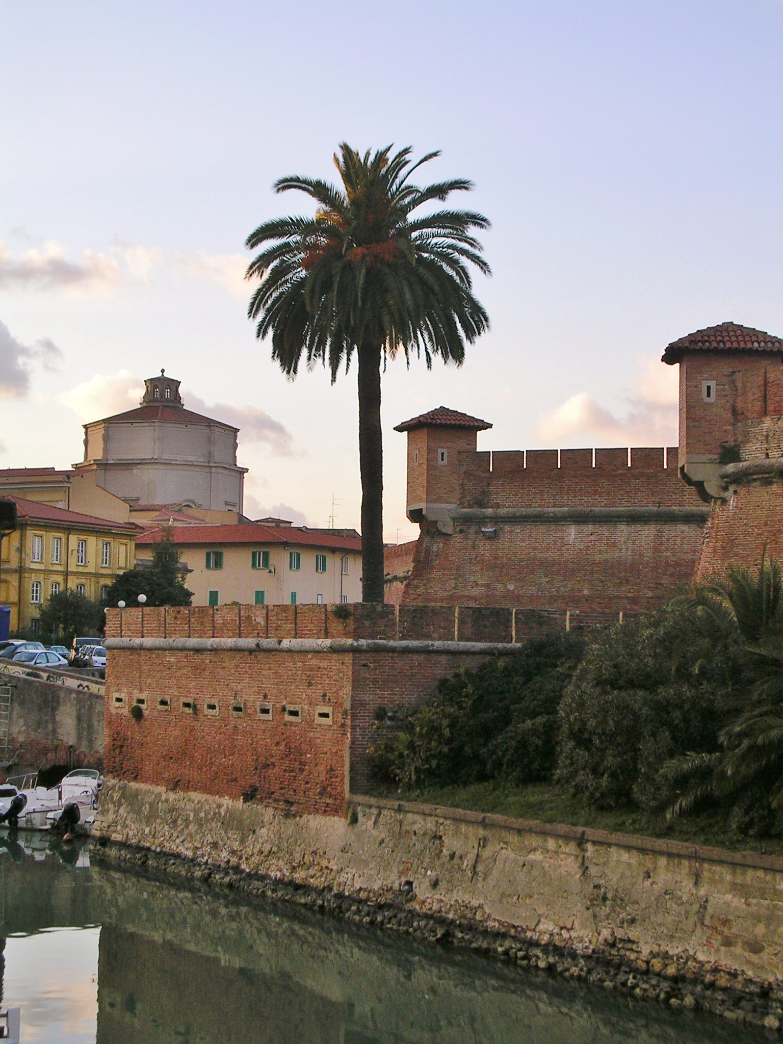 Livorno, quartiere della Venezia Nuova: la Fortezza Nuova e la cupola della chiesa di Santa Caterina.